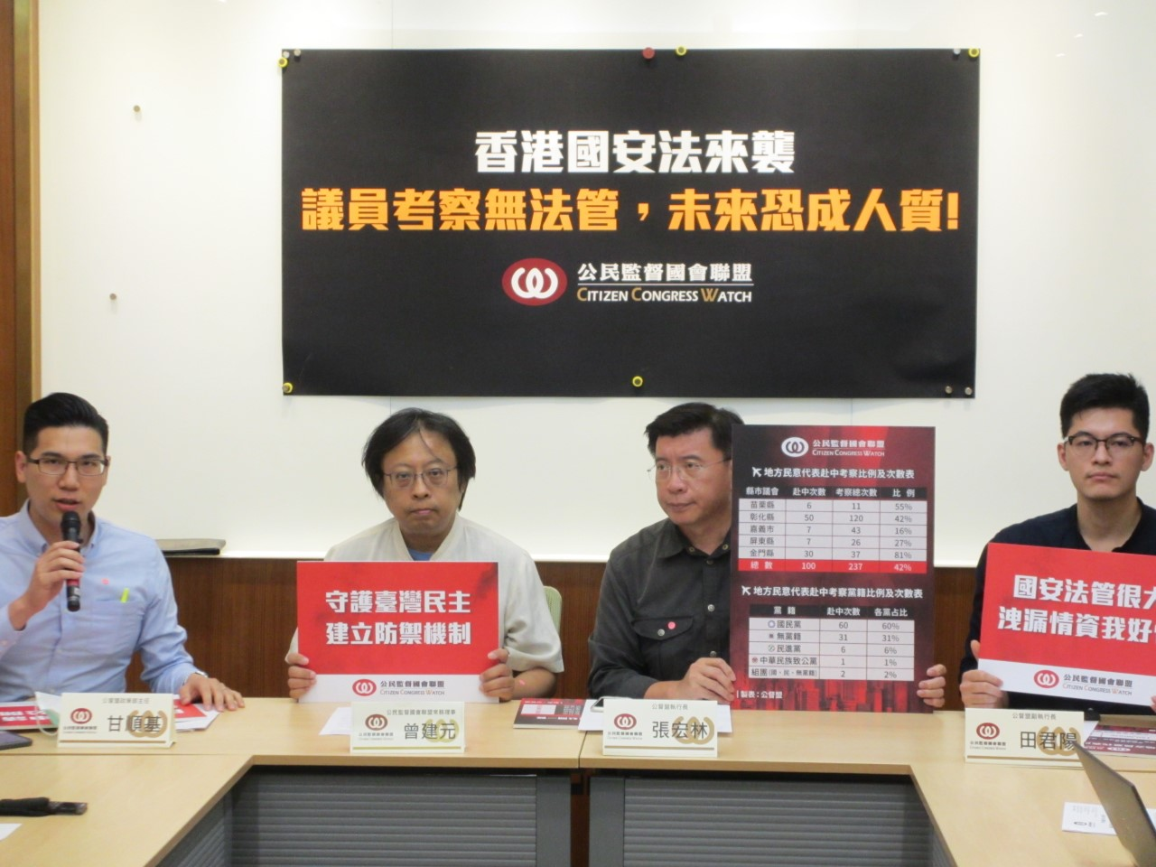 台灣公民監督國會聯盟2020年7月9日召開一場因應香港國安法的 記者會